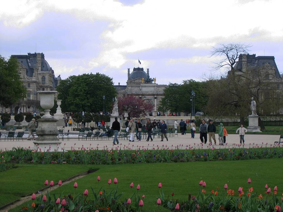 Tuleriengärten, Blick zum Louvre